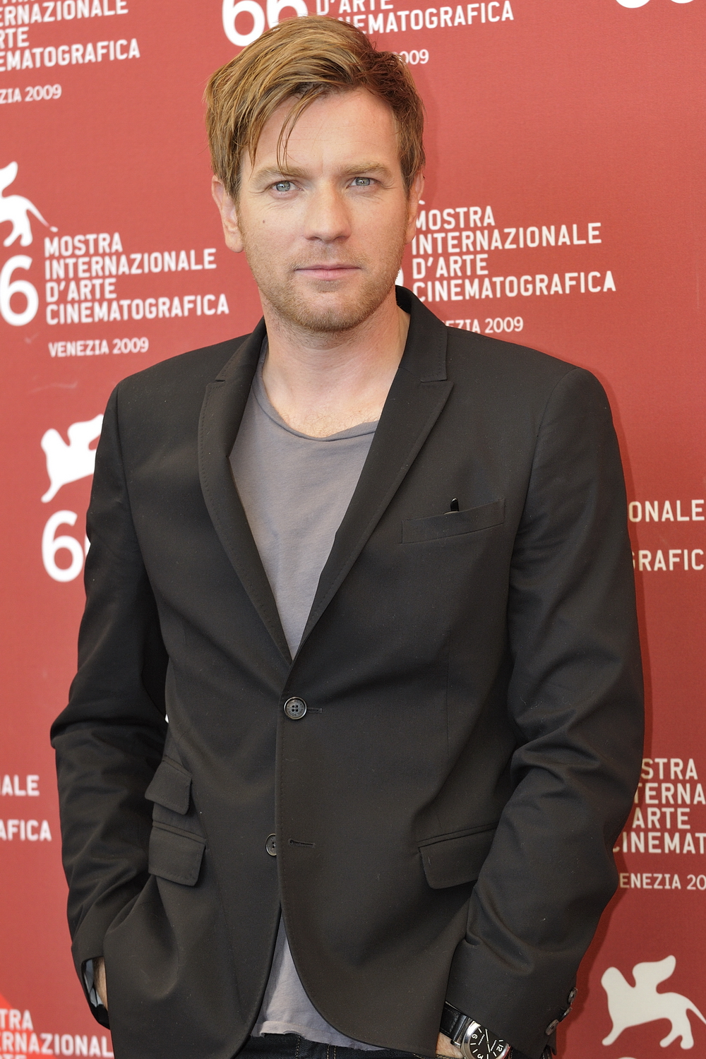 66ème Festival du Cinéma de Venise (Mostra), 6ème jour (07/09/2009) Photocall avec George Clooney et Elisabetta Canalis, Ewan McGregor et le réalisateur Grant Heslov pour le film : The men who stare at goats